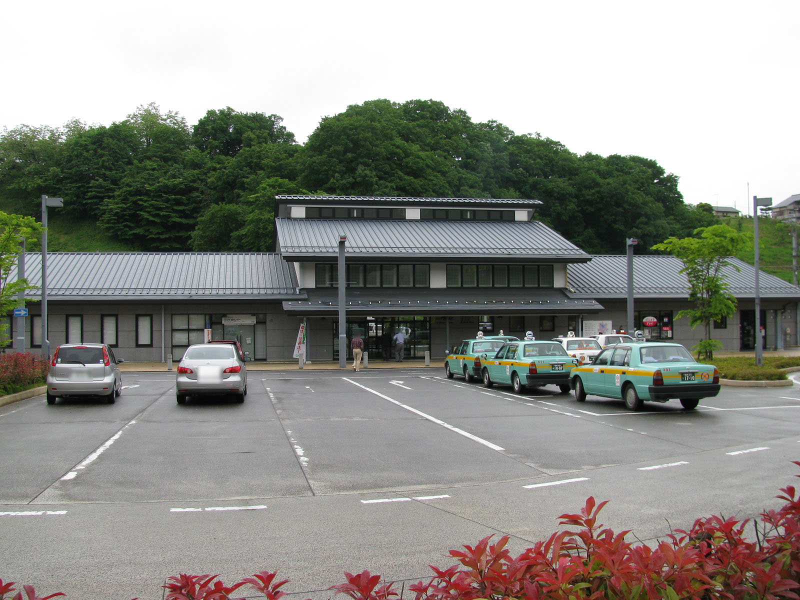 磐越東線三春駅